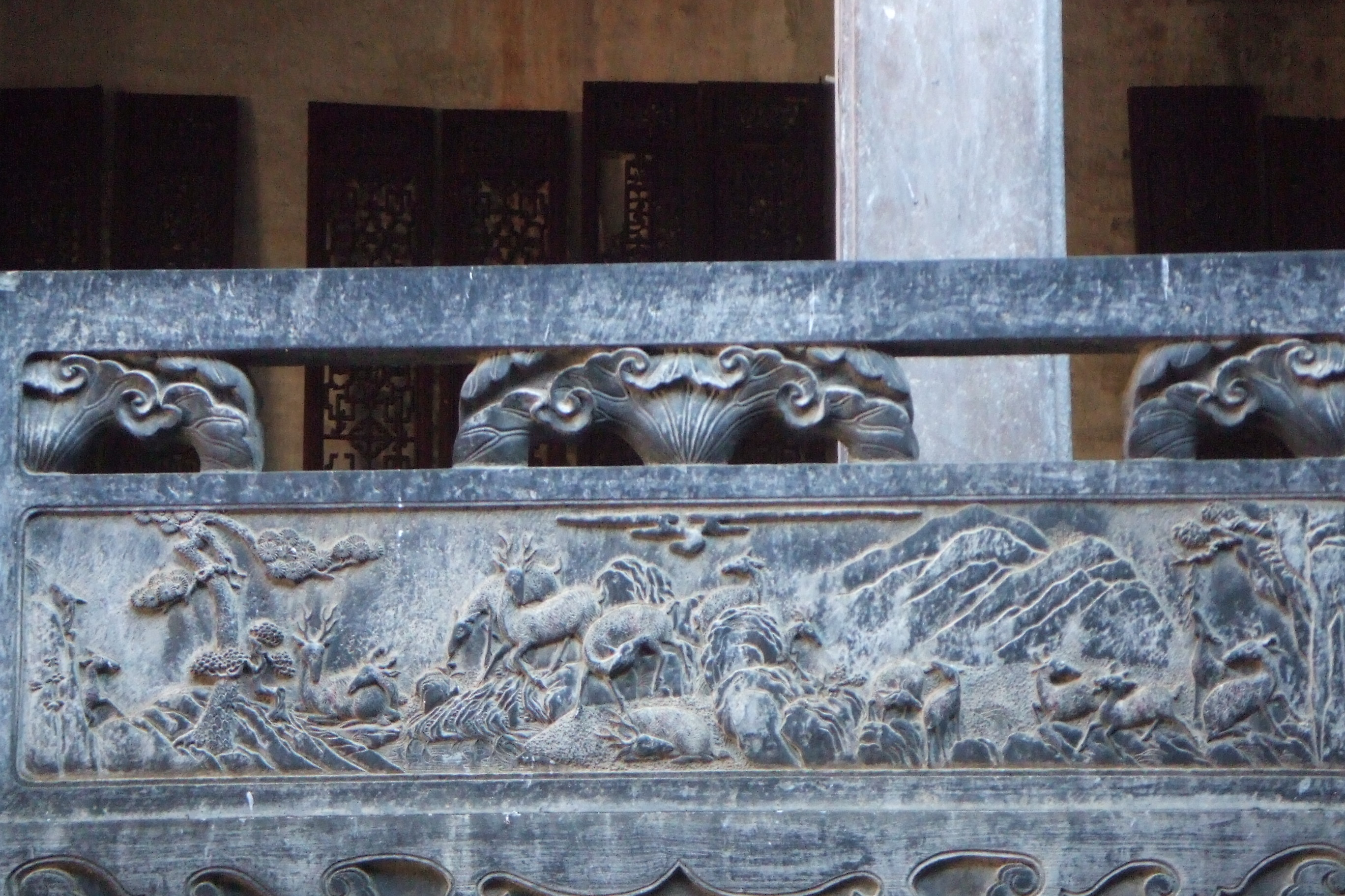 中國安徽省黃山市歙縣北岸鎮的吳氏宗祠，百鹿圖之一（FinePix Z1富士通數碼相機/洪洋/ 2005/09/13）